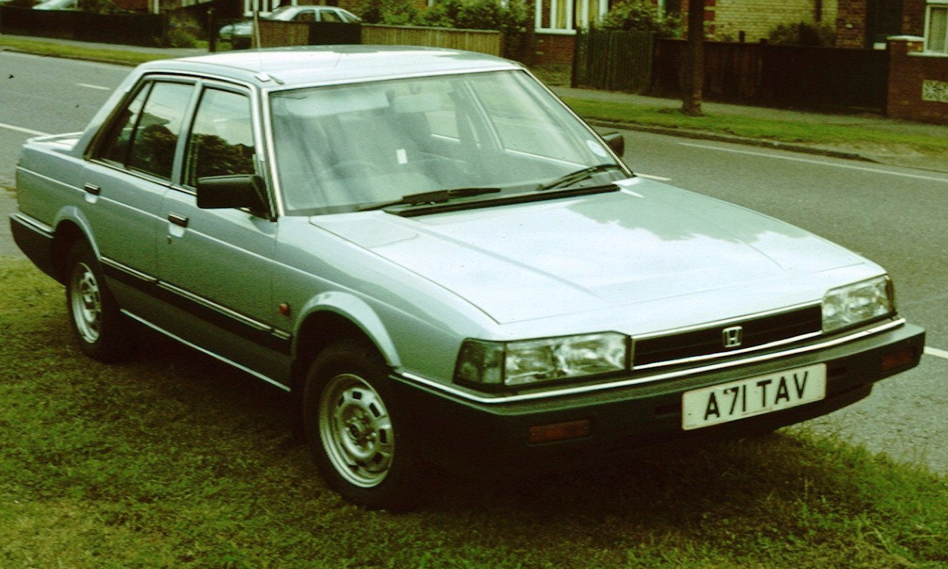 Honda Accord 4 door sedan 1983 in Cambridge England